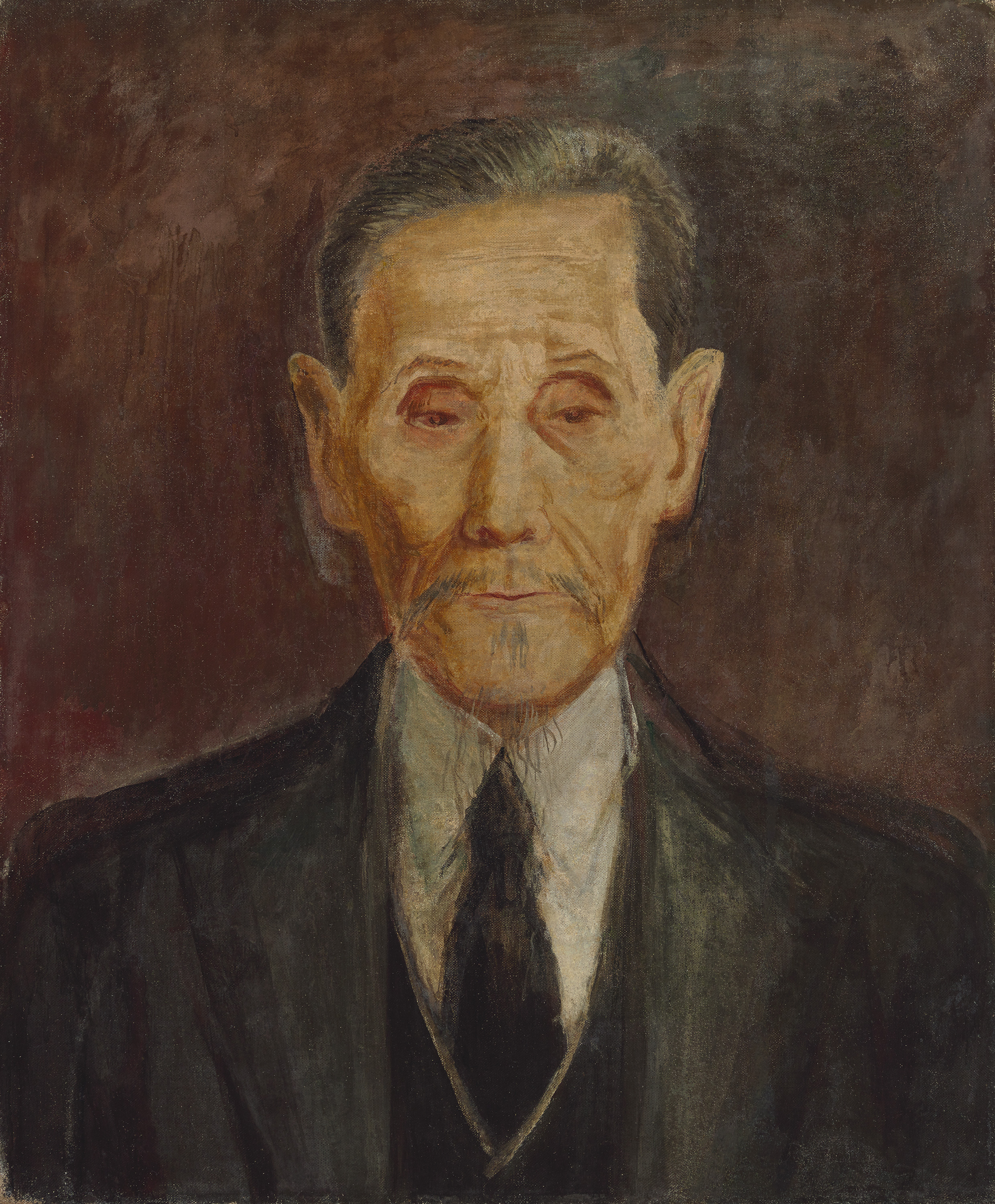 中文（台灣）: 李梅樹所繪的父親遺像，未完成。